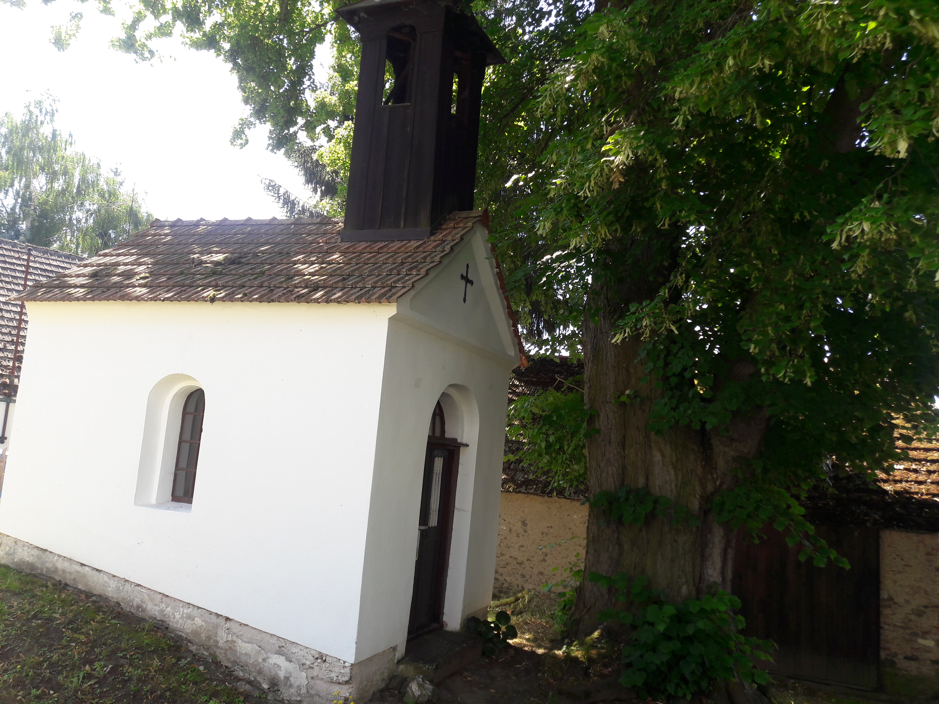 Losiny, kaplička